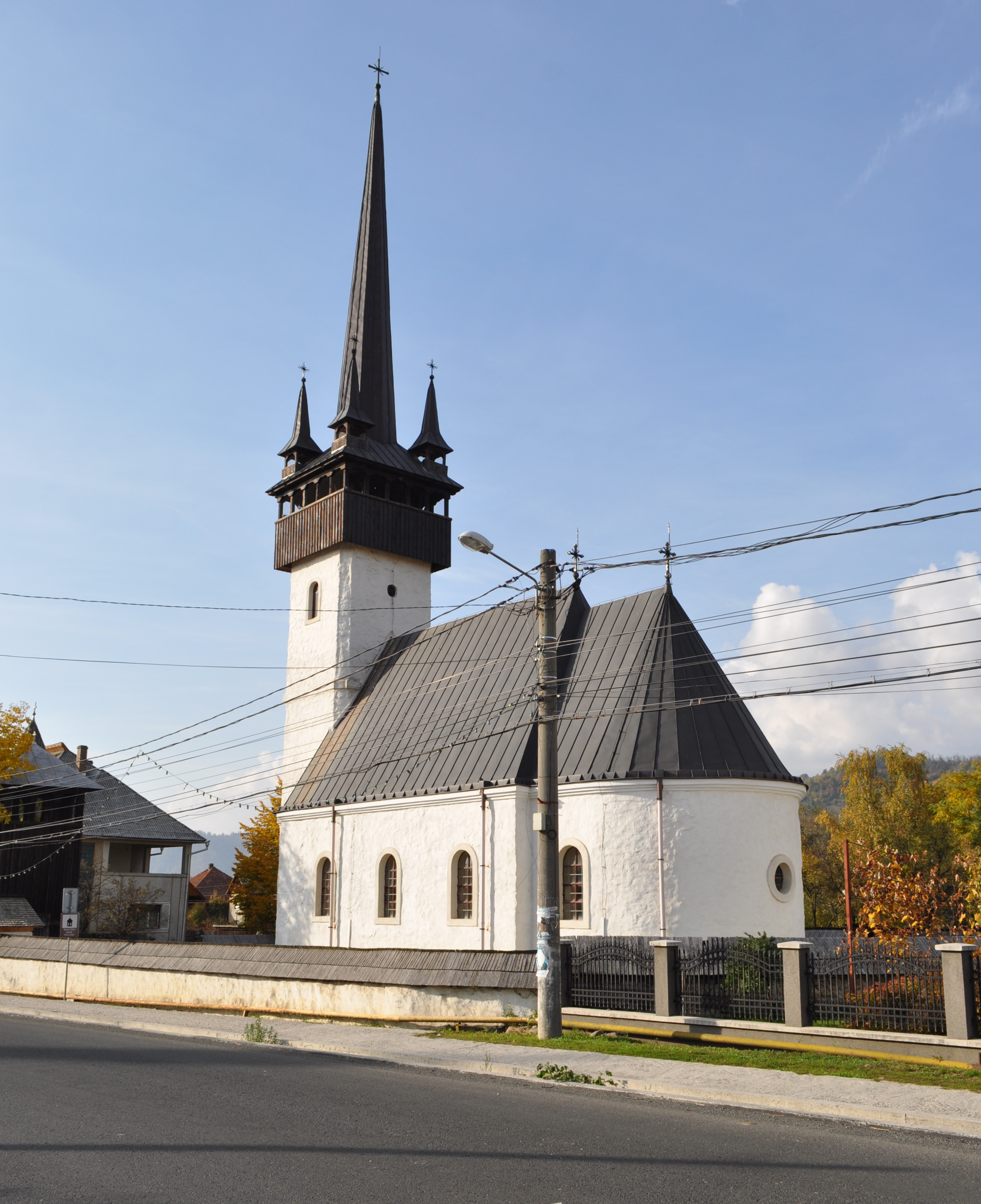 Biserica de piatră "Sf. Apostoli Petru și Pavel" (fostă greco-catolică), sat aparținător Tăuții de Sus; oraș Baia Sprie, județul Maramureș